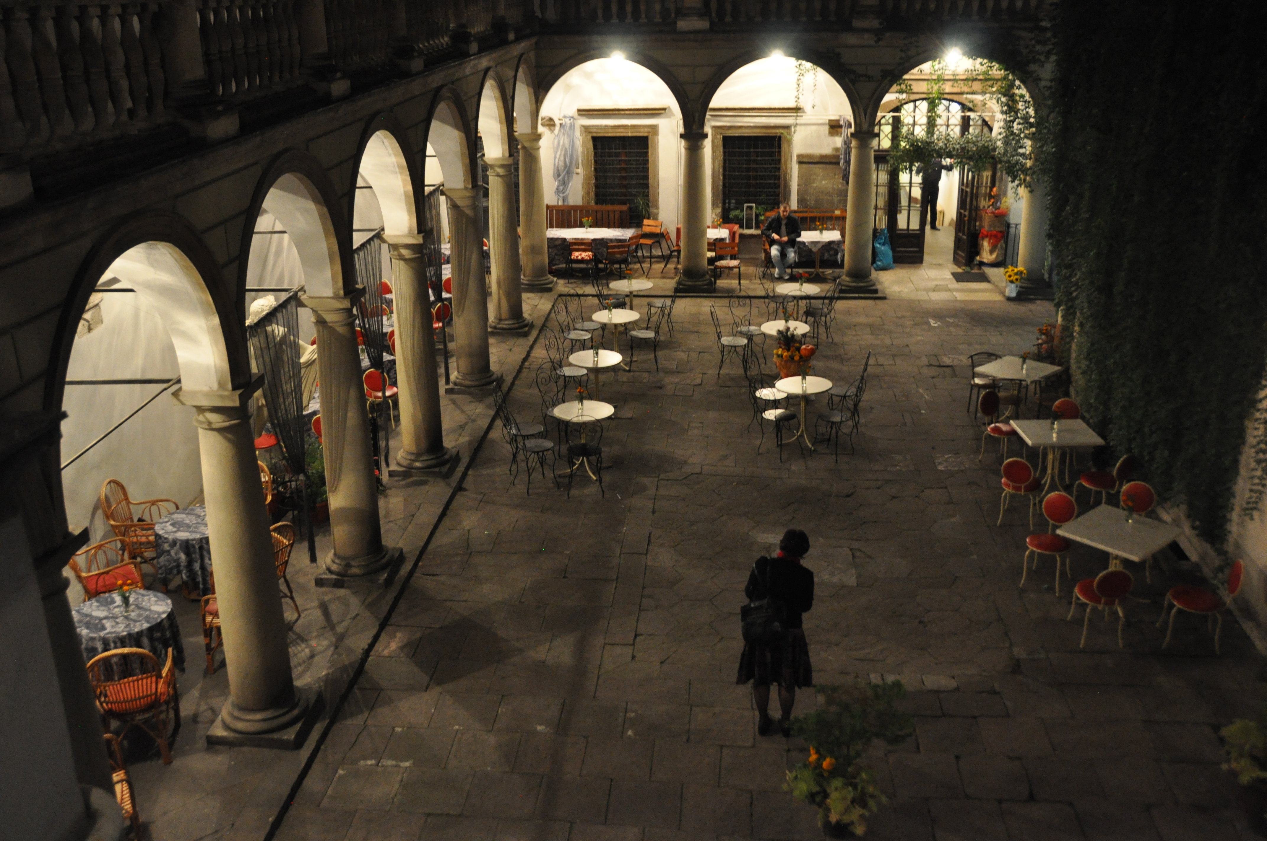 Італійське подвір'я, внутрішня частина Королівського палацу на пл.Ринок 6, у якому розміщені Історичний музей, Ротарі клуб "Леополіс" та ресторан. У подвір'ї часто проводяться камерні концерти.